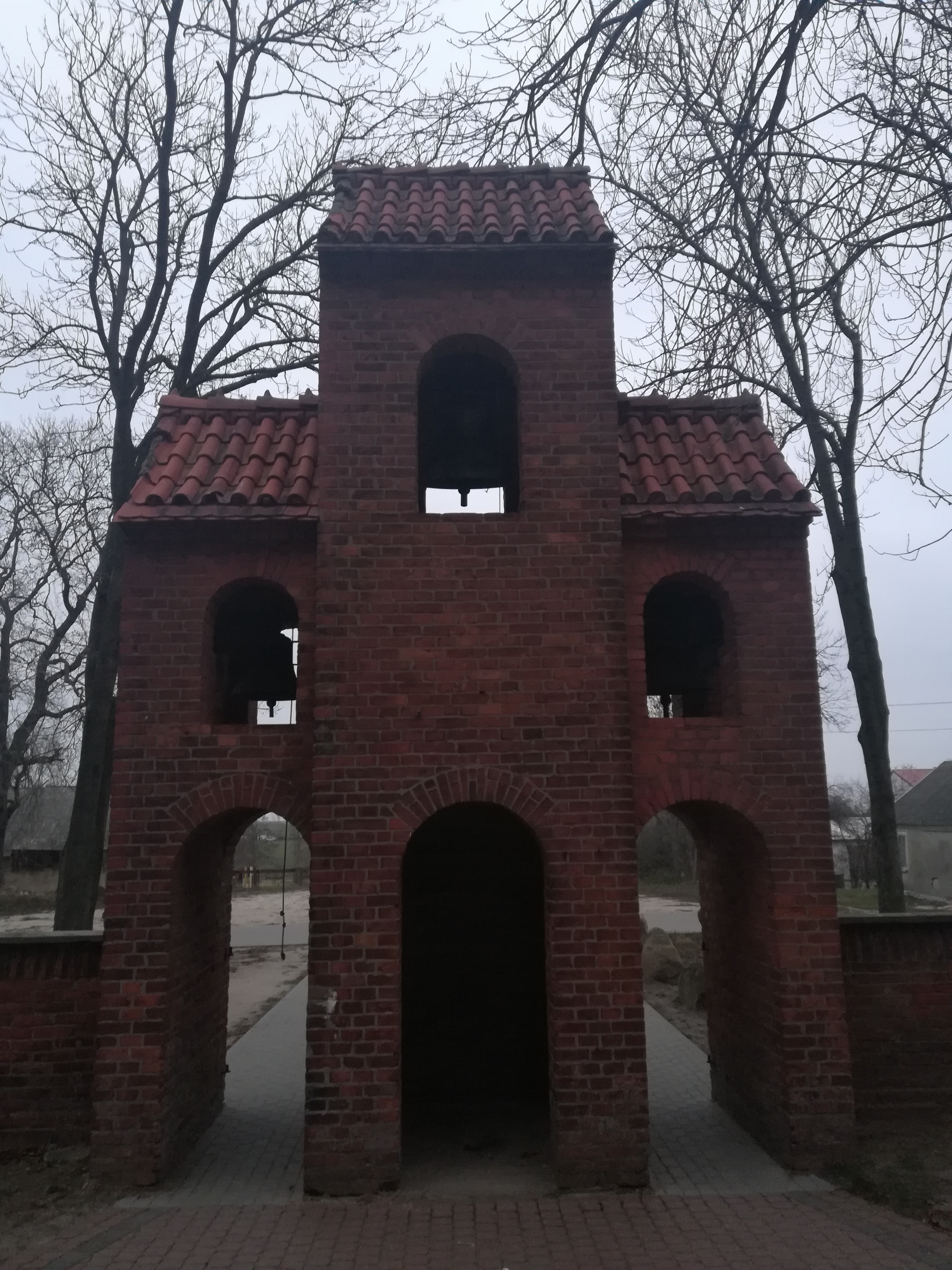 Mokowo